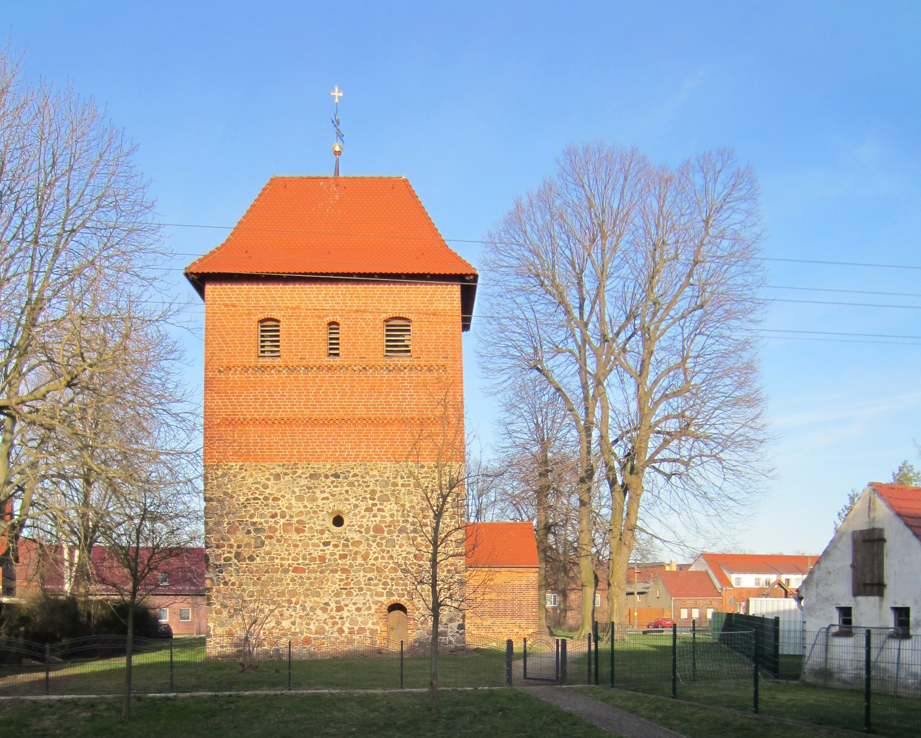 Rosenthal, Stadt Dahme/Mark, denkmalgeschützte Dorfkirche, Ansicht von Westen